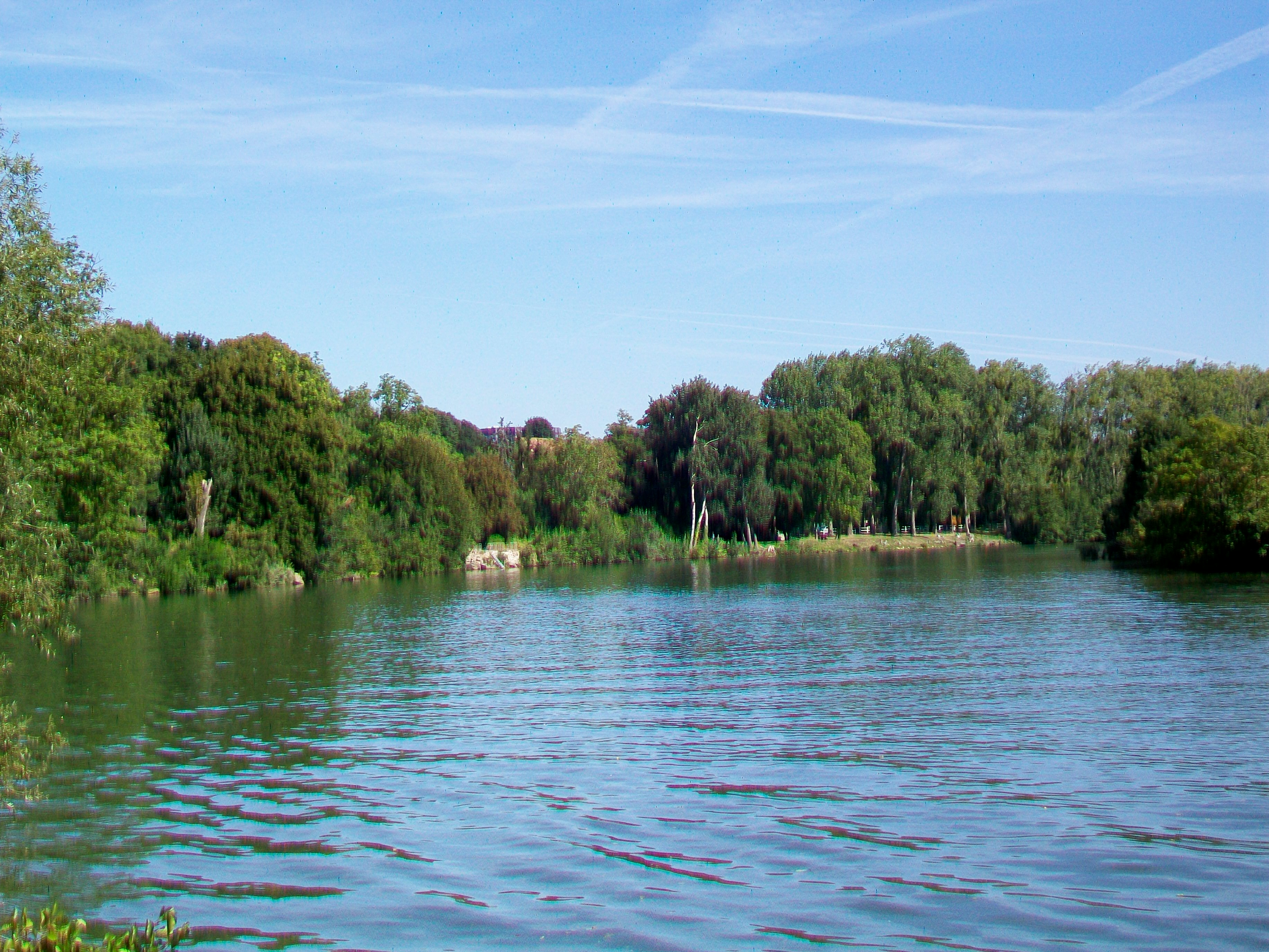 L'Oise près du hameau de Gency, à Cergy (au nord de la grande boucle autour des lacs de Cergy / Neuville).